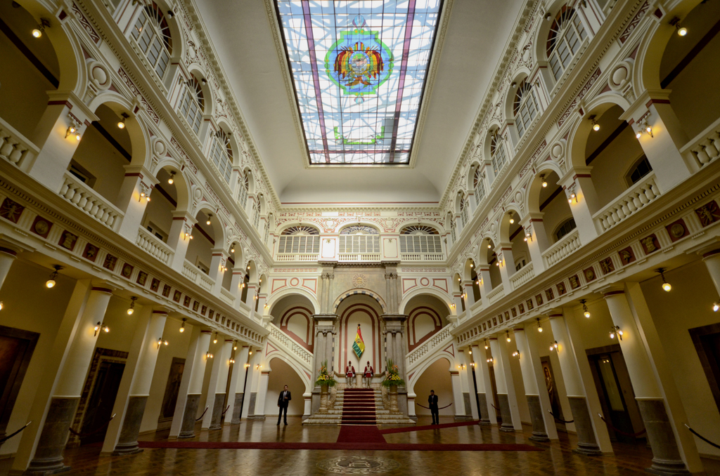 Palacio de Gobierno, Palacio Quemado This medium shows the protected monument with the number L/00-078 in Bolivia.